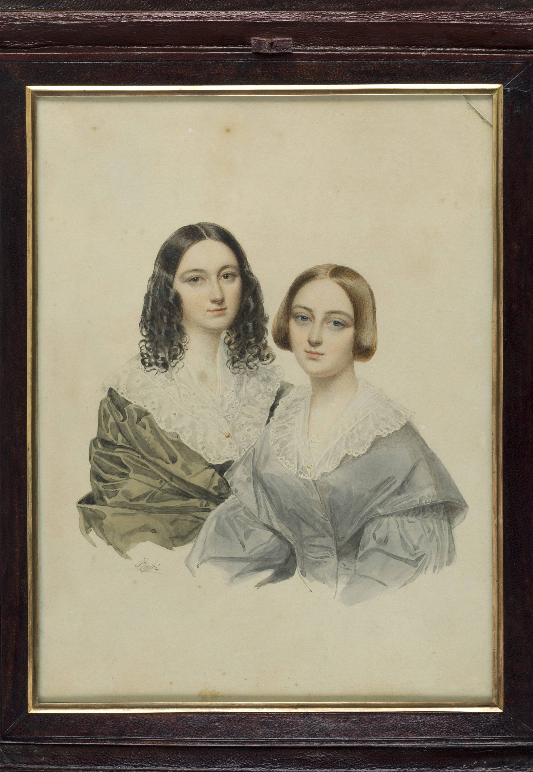 Pietro de Rossi, Portret podwójny Zofii (po lewej) i Elizy Branickich, 1840, akwarela i gwasz na papierze, Muzeum Narodowe w Warszawie